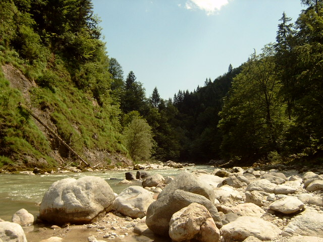 Brandenberger Ache in der Nähe von Kramsach This media shows the natural monument in the Tyrol with the ID ND_5_61.